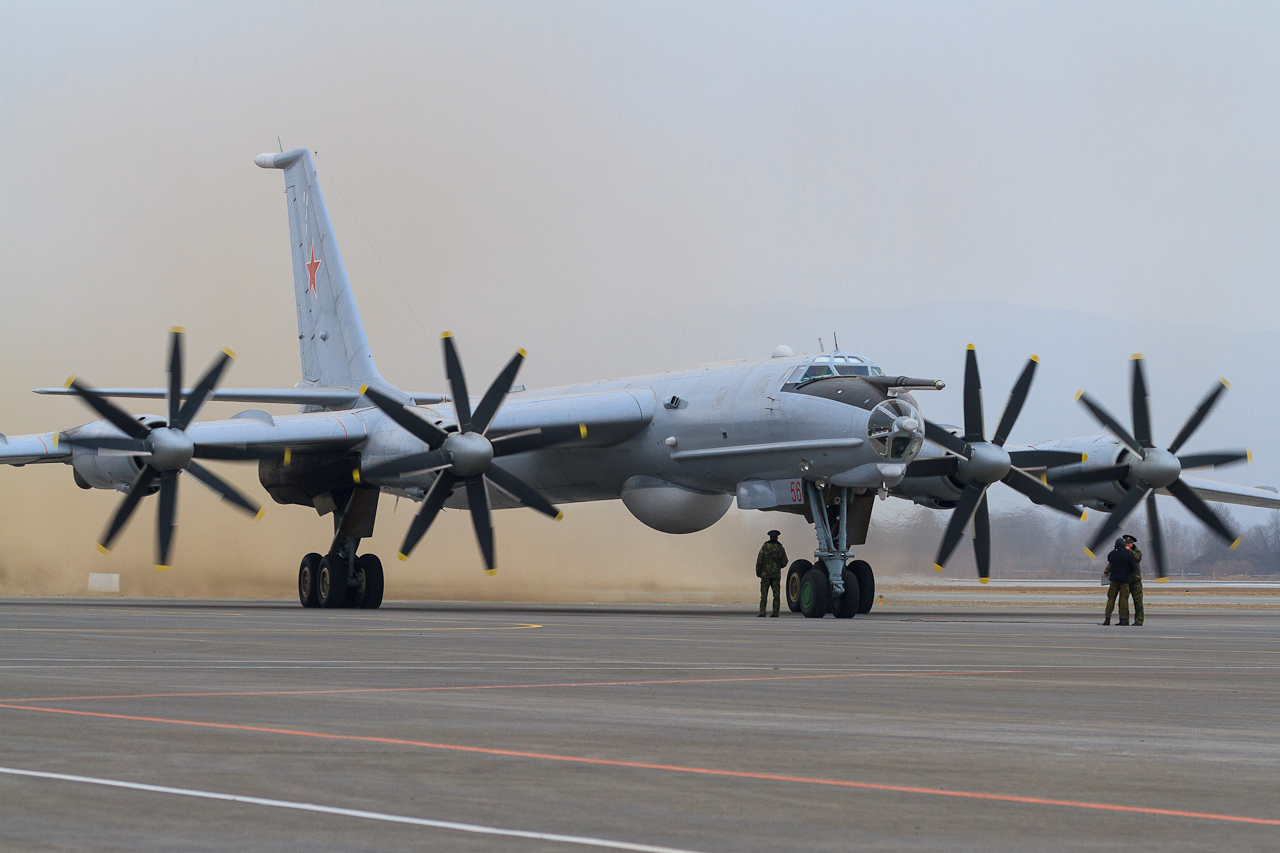 _MG_0260